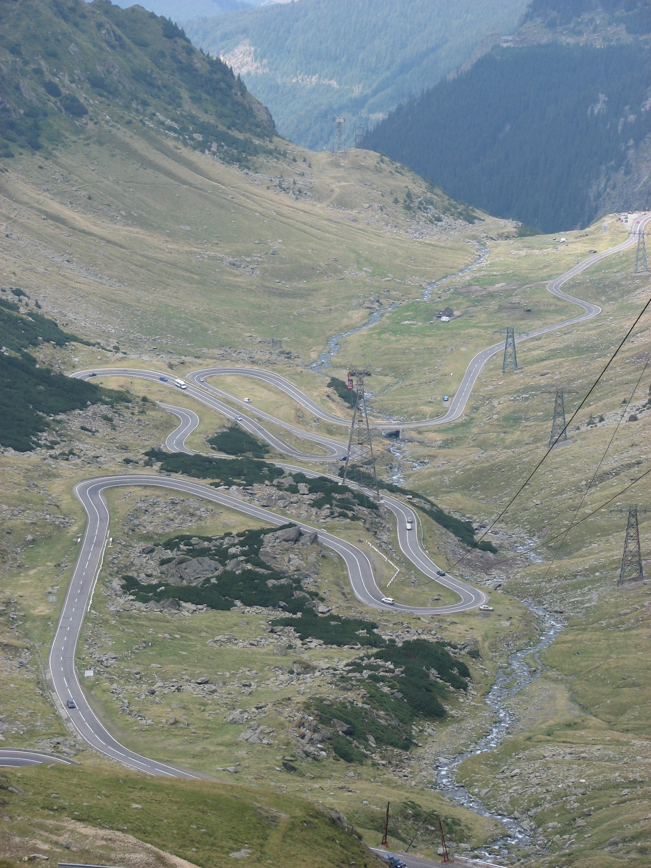 Transfăgărăşan, Romania